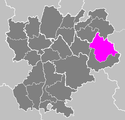 Maps of arrondissements and cantons of France: Arrondissement d Albertville.PNG (Région Rhône-Alpes)